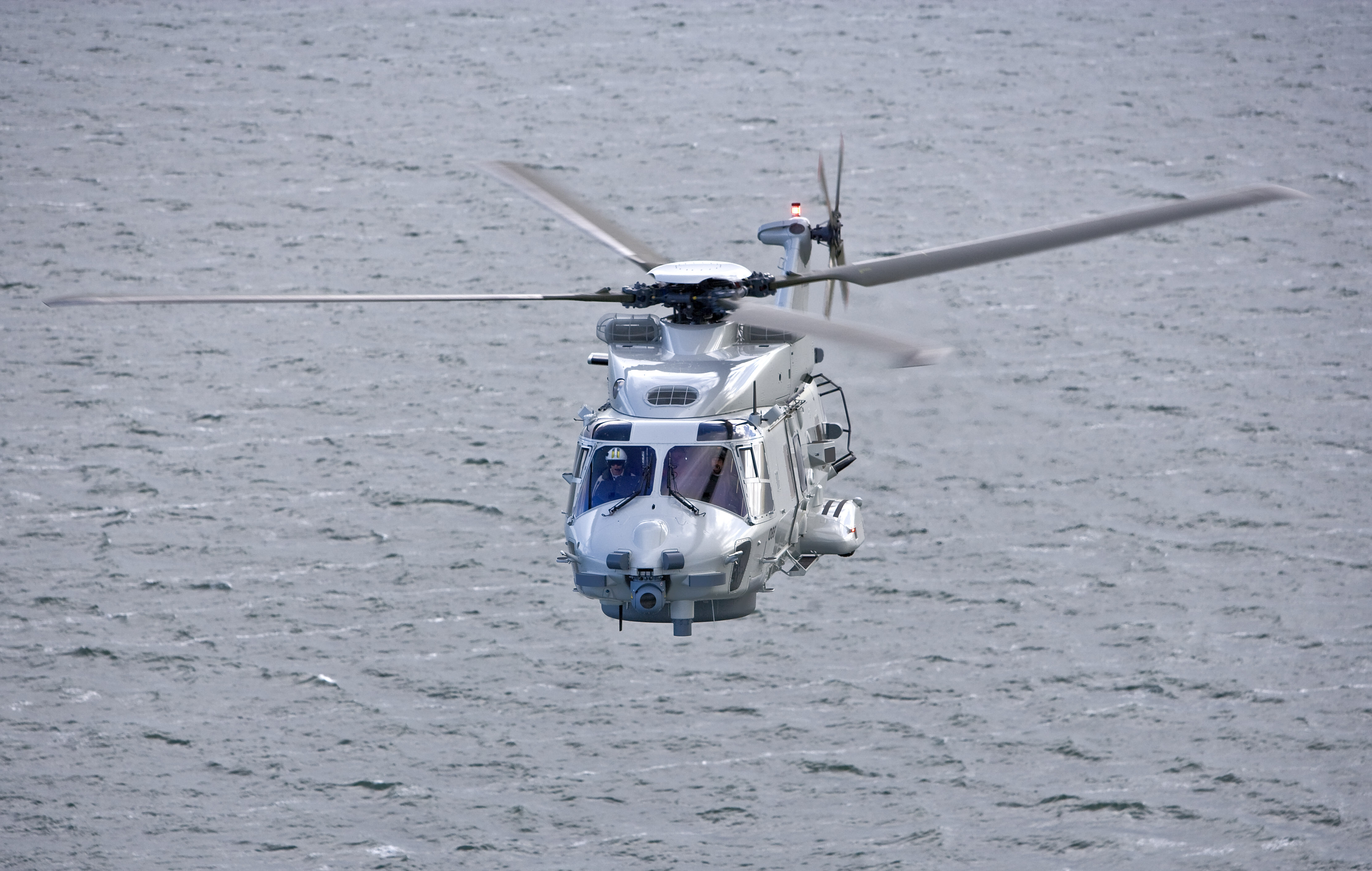 De NH90 is in de eerste plaats een maritieme (gevechts)helikopter die kan opereren vanaf patrouilleschepen en luchtverdedigings- en commandofregatten. Defensie gebruikt het toestel ook als transporthelikopter boven land of vanaf bijvoorbeeld vanaf de amfibische transportschepen en het nieuwe Joint logistic Support Ship Karel Doorman. Bijvoorbeeld voor het afzetten van special forces, zoals boarding teams.